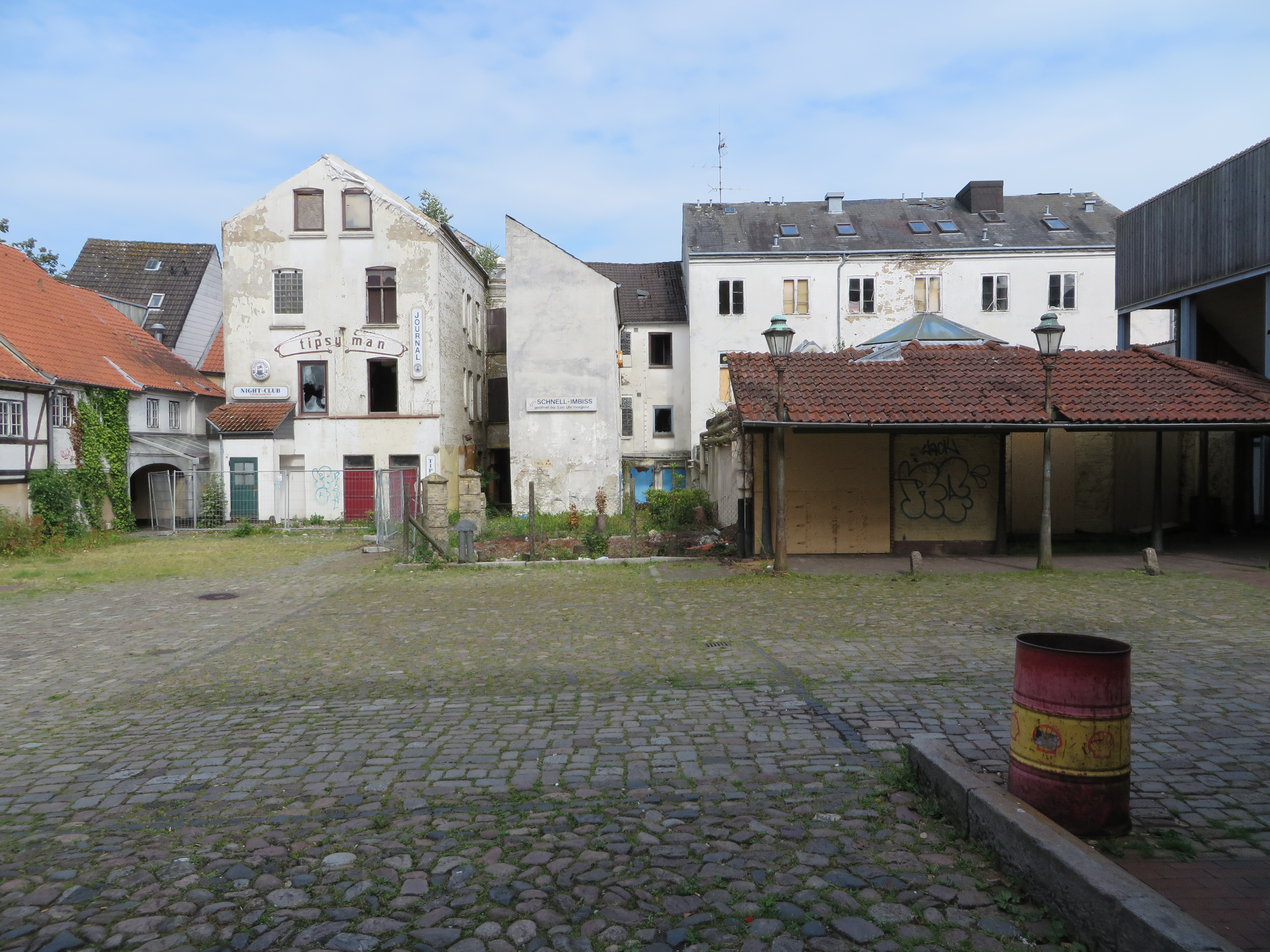 Altes Rotlicht-Viertel Kayser’s Hof (Flensburg 2014)